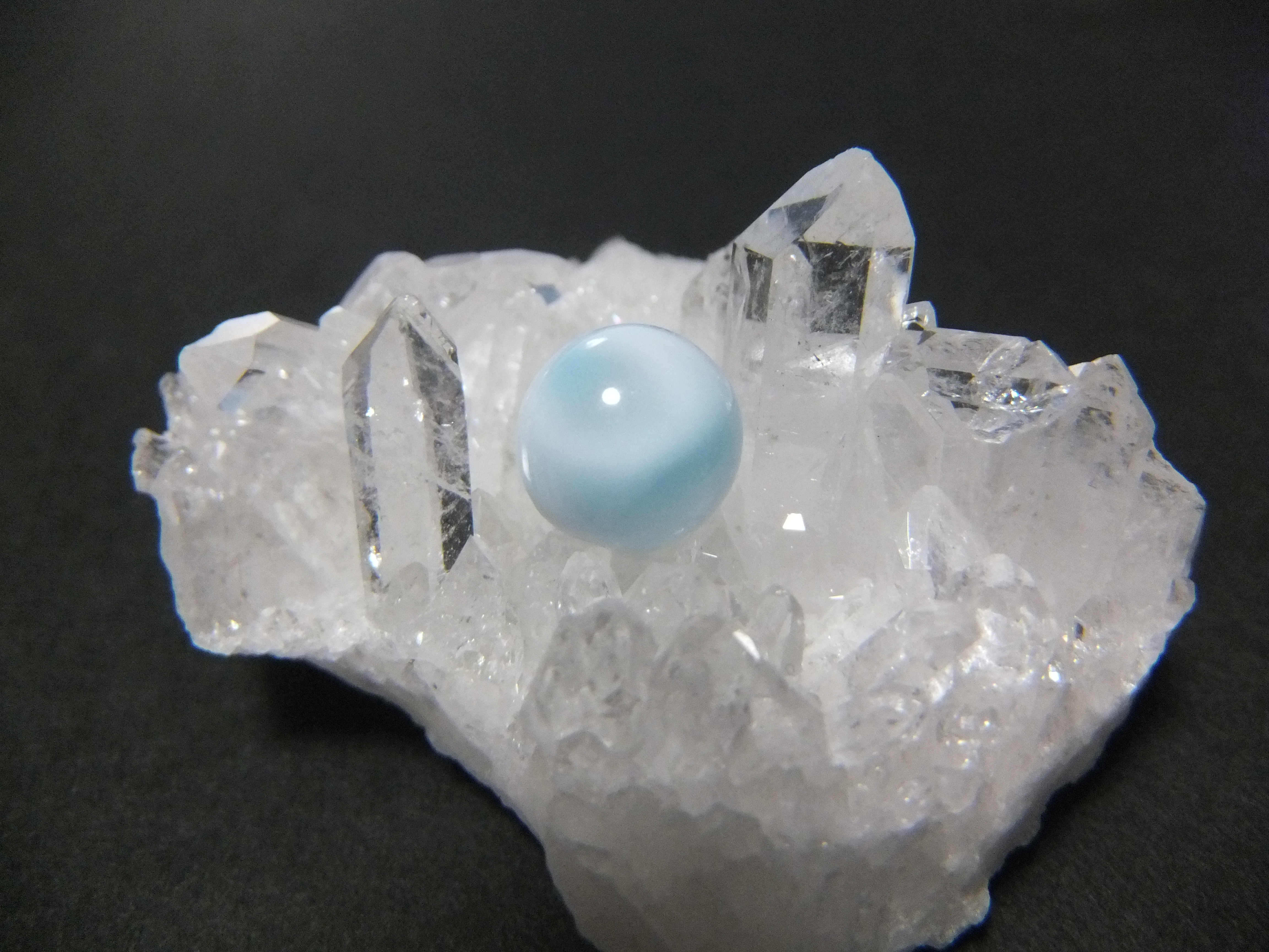 ラリマー。キャッツアイ効果が入っている。土台はヒマラヤ水晶。